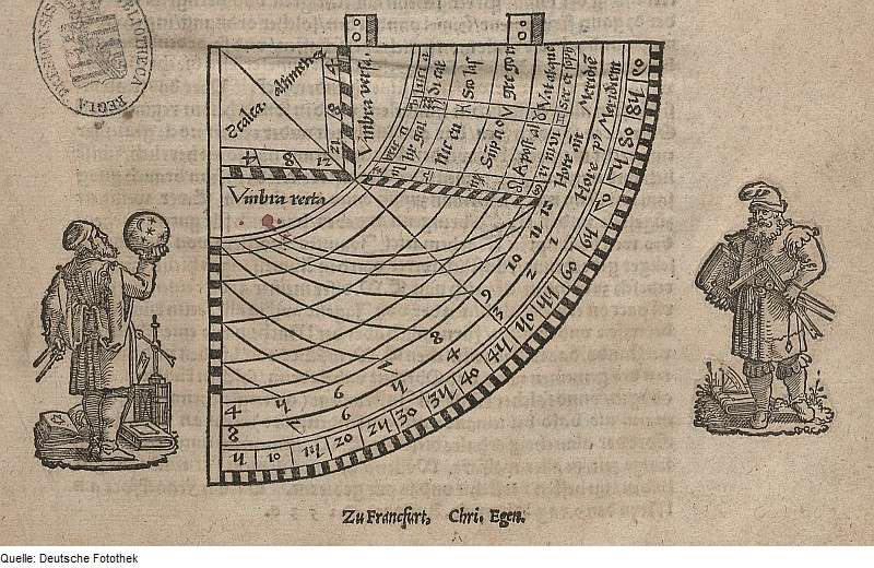 Original image description from the Deutsche Fotothek Geometrie & Vermessung & Messinstrument